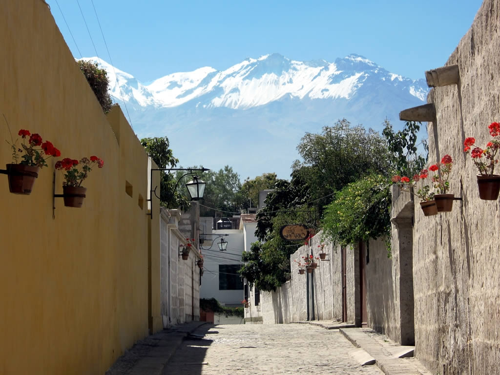 Calles de Yanahuara, se puede apreciar la cordillera de los Andes al fondo.